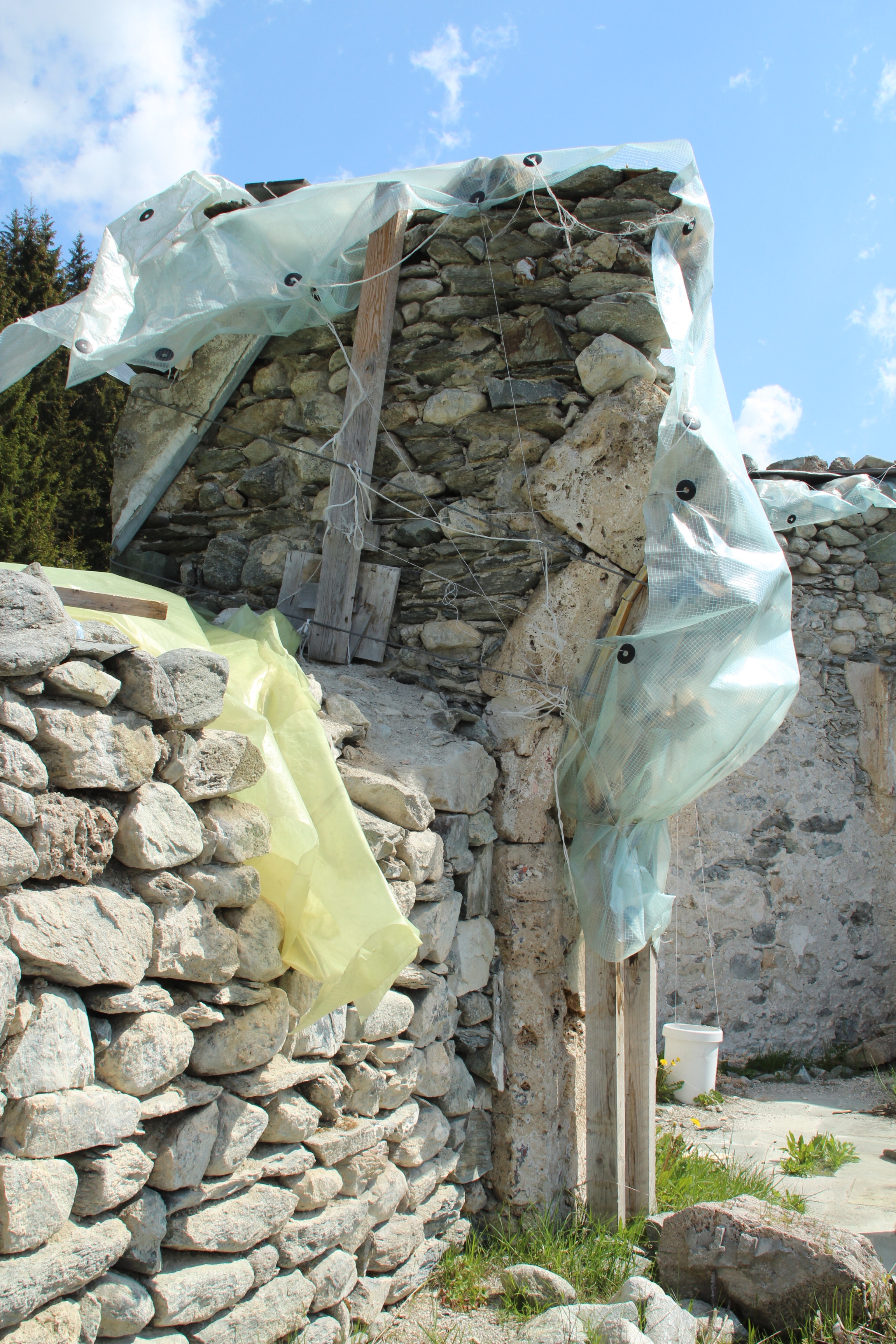 Ruine Caplutta Sogn Benedetg Rest des Chorbogens